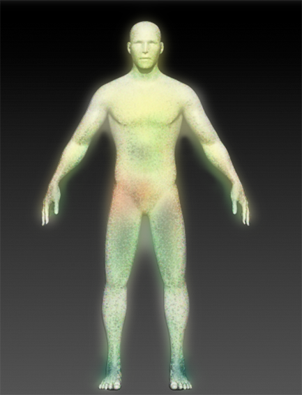 Representação aproximada do duplo etérico feita digitalmente com software de edição para fins de exemplificação